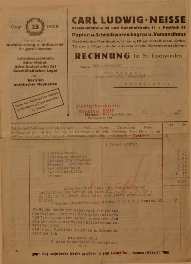 Rechnung an das erzbischöflich Pfarramt mit den drei Abteilungen der Fa. Carl Ludwig